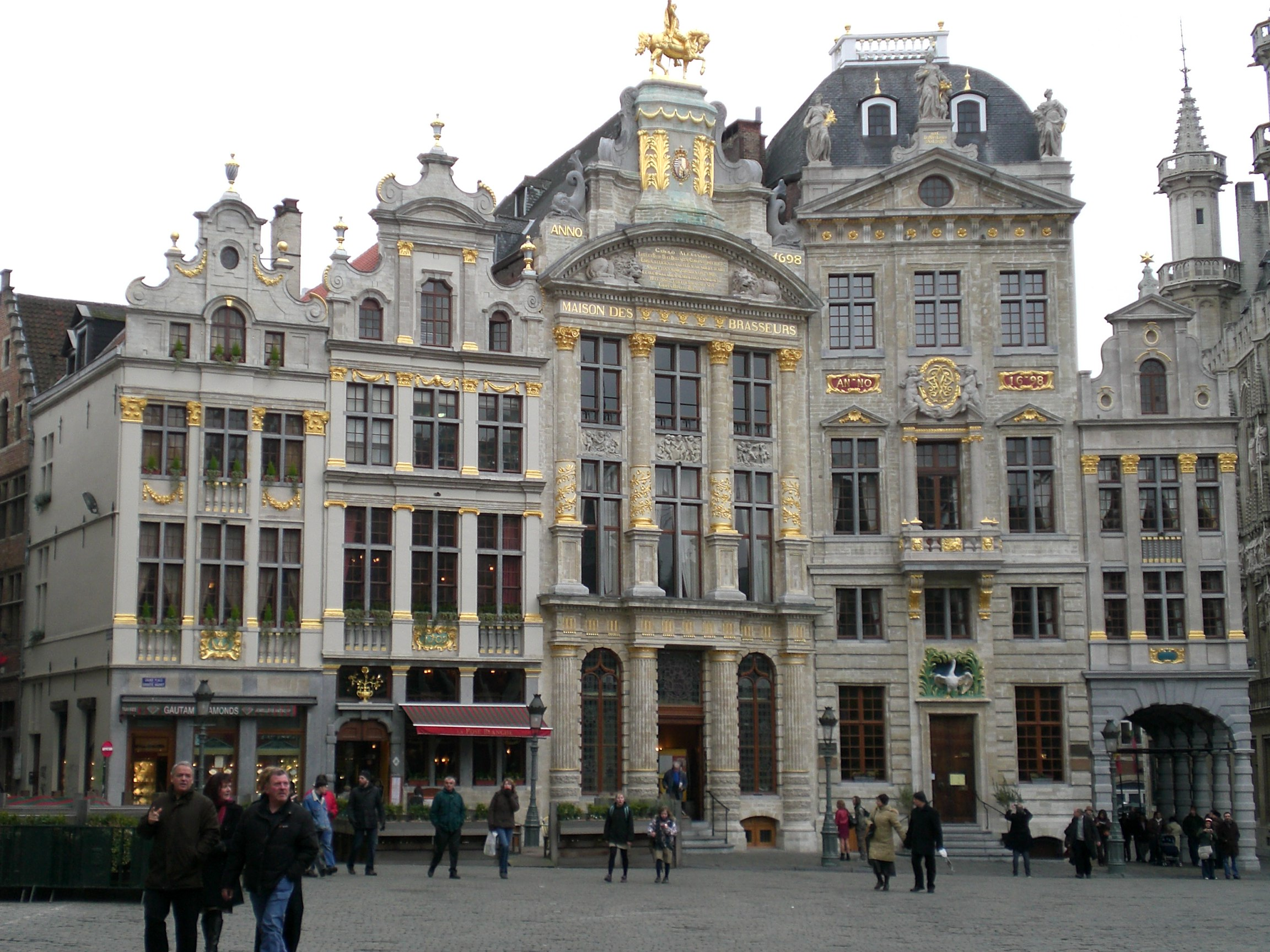 Maison des Brasseurs sur la Grand Place de Bruxelles.